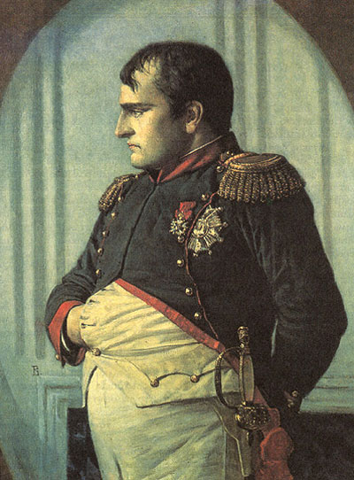 В Петровском дворце (в ожидании мира)